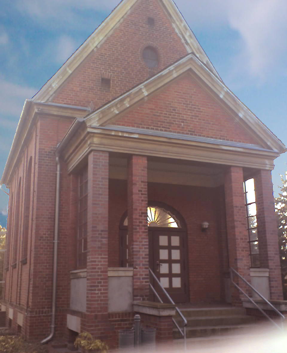 Die Feierhalle im gothisierenden Stil auf Friedhof Pankow V